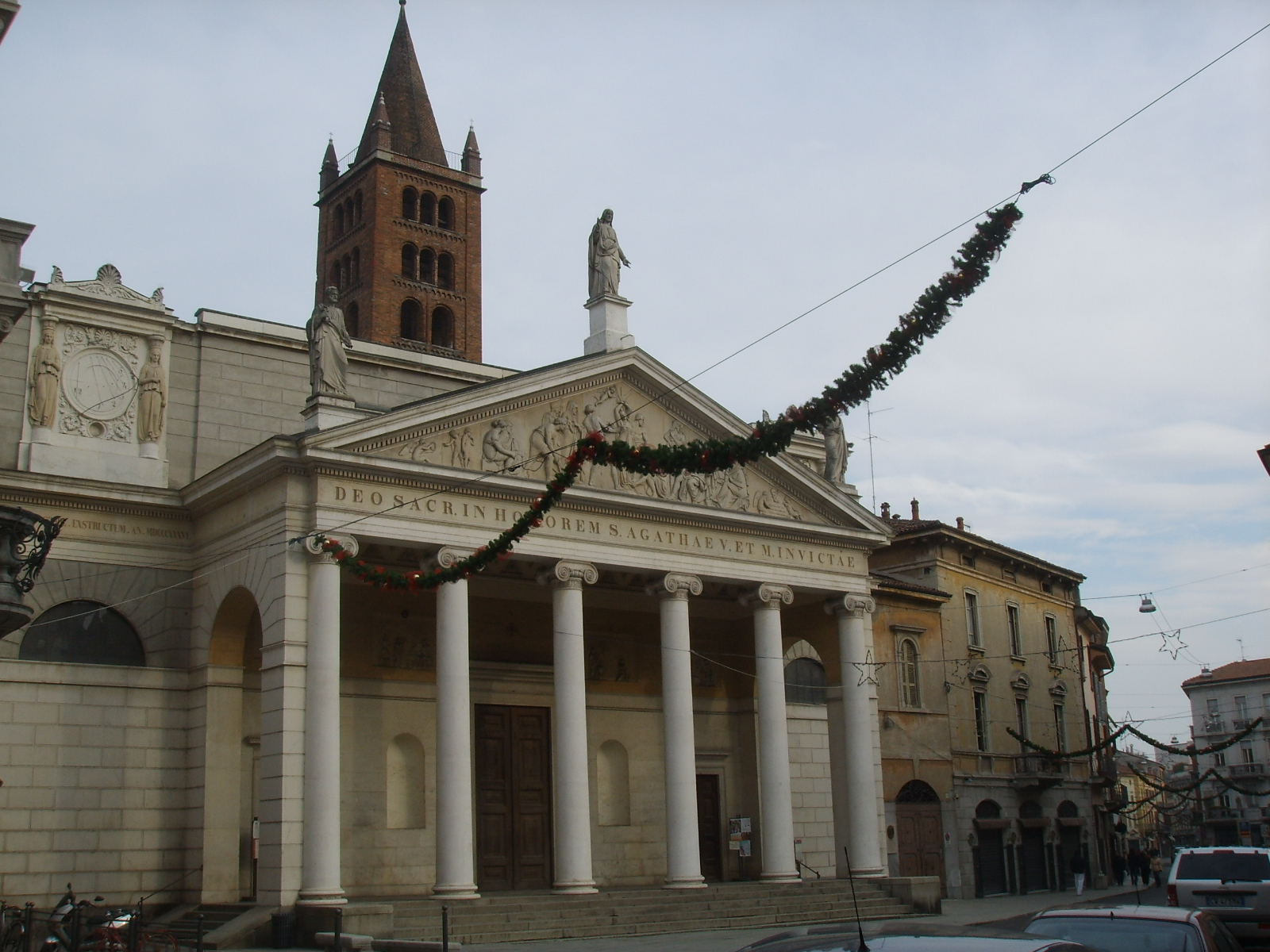 Cremona, chiesa di sant'agata